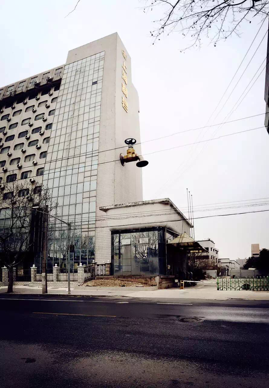 上海制皂有限公司大厦